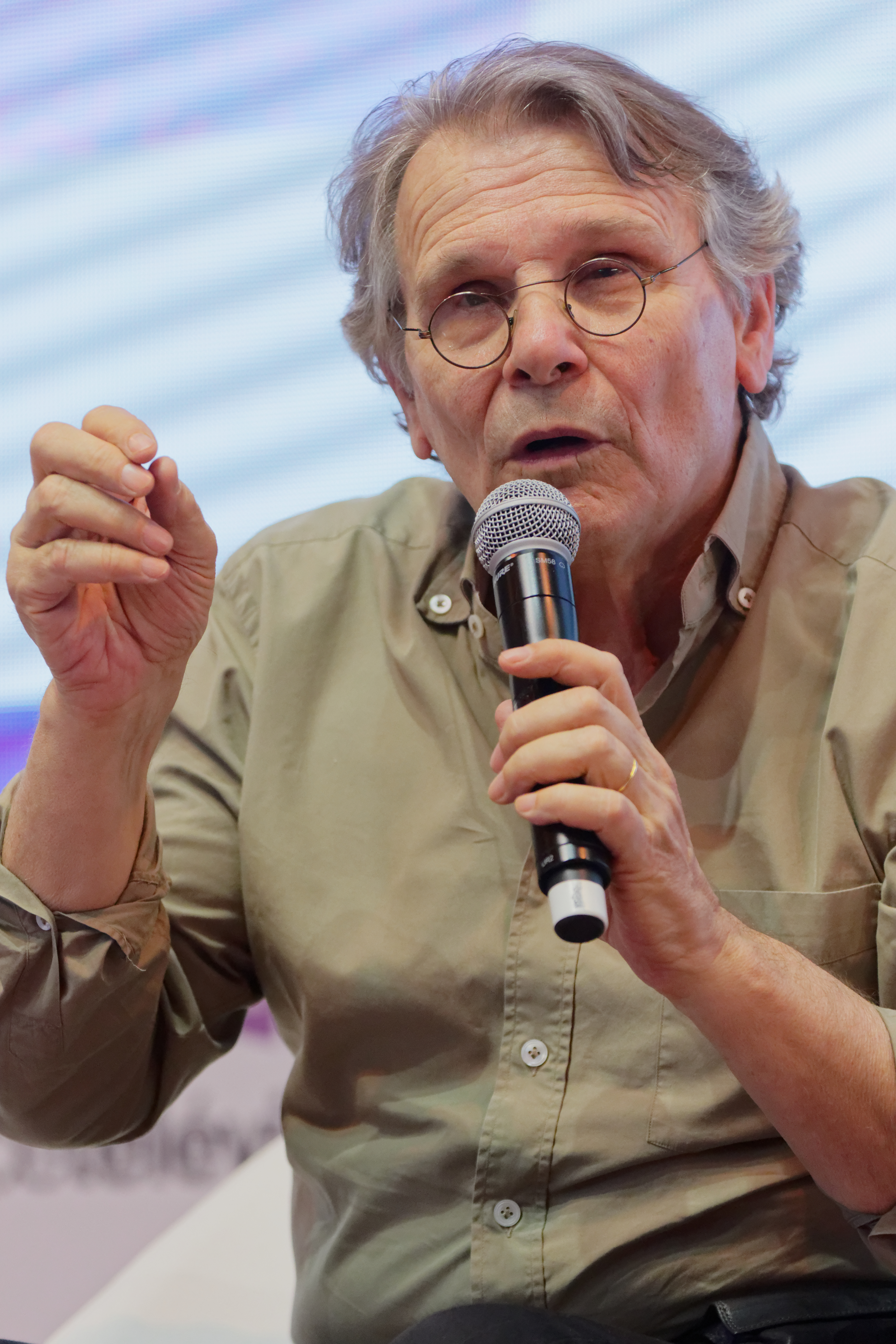 Daniel Pennac en conférence lors du salon du livre de Paris 2017.